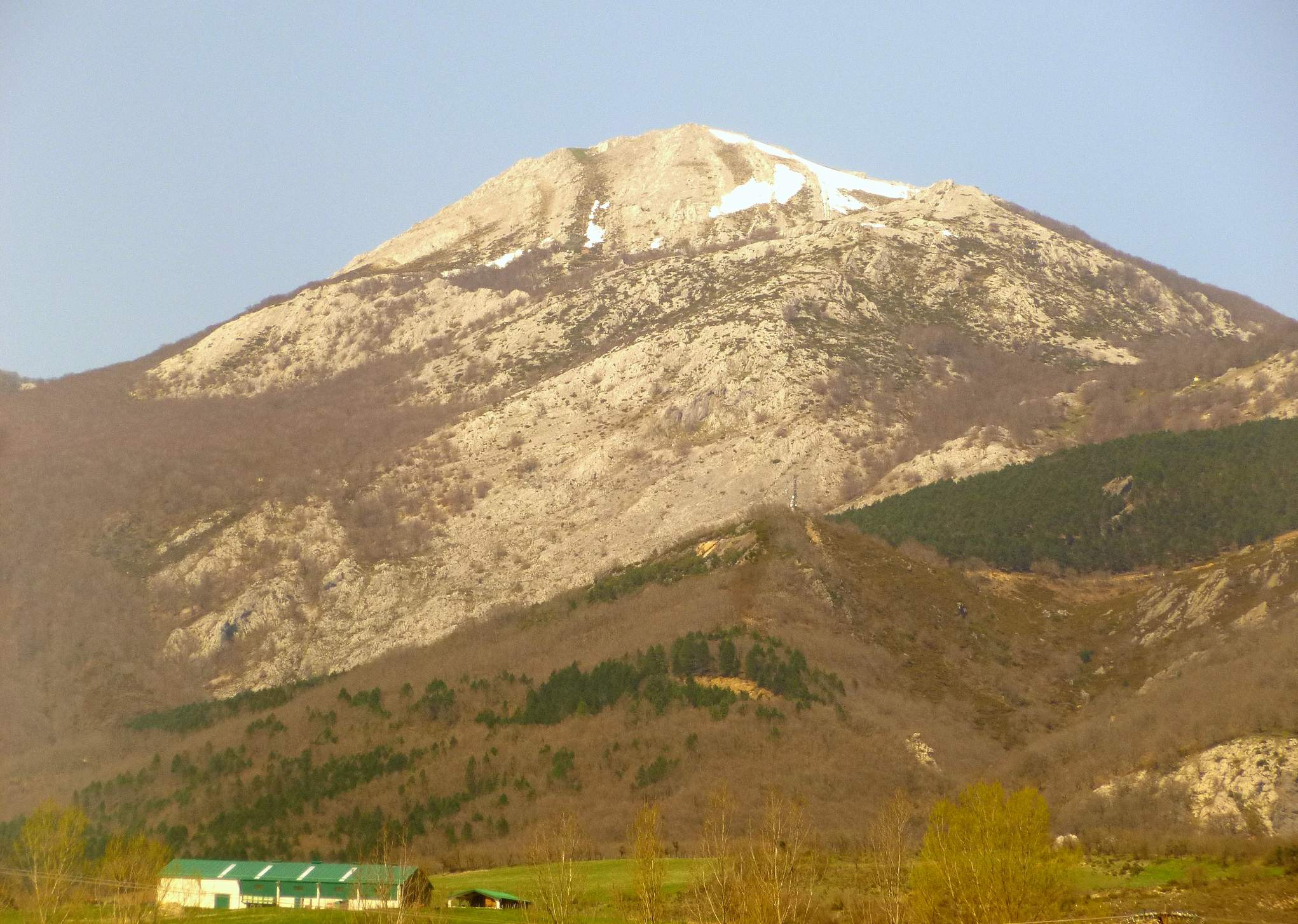 Monte Aratz (Gipúzkoa)